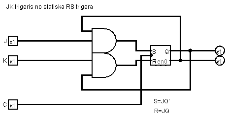 Simulating a JK flip-flop using an RS flip-flop